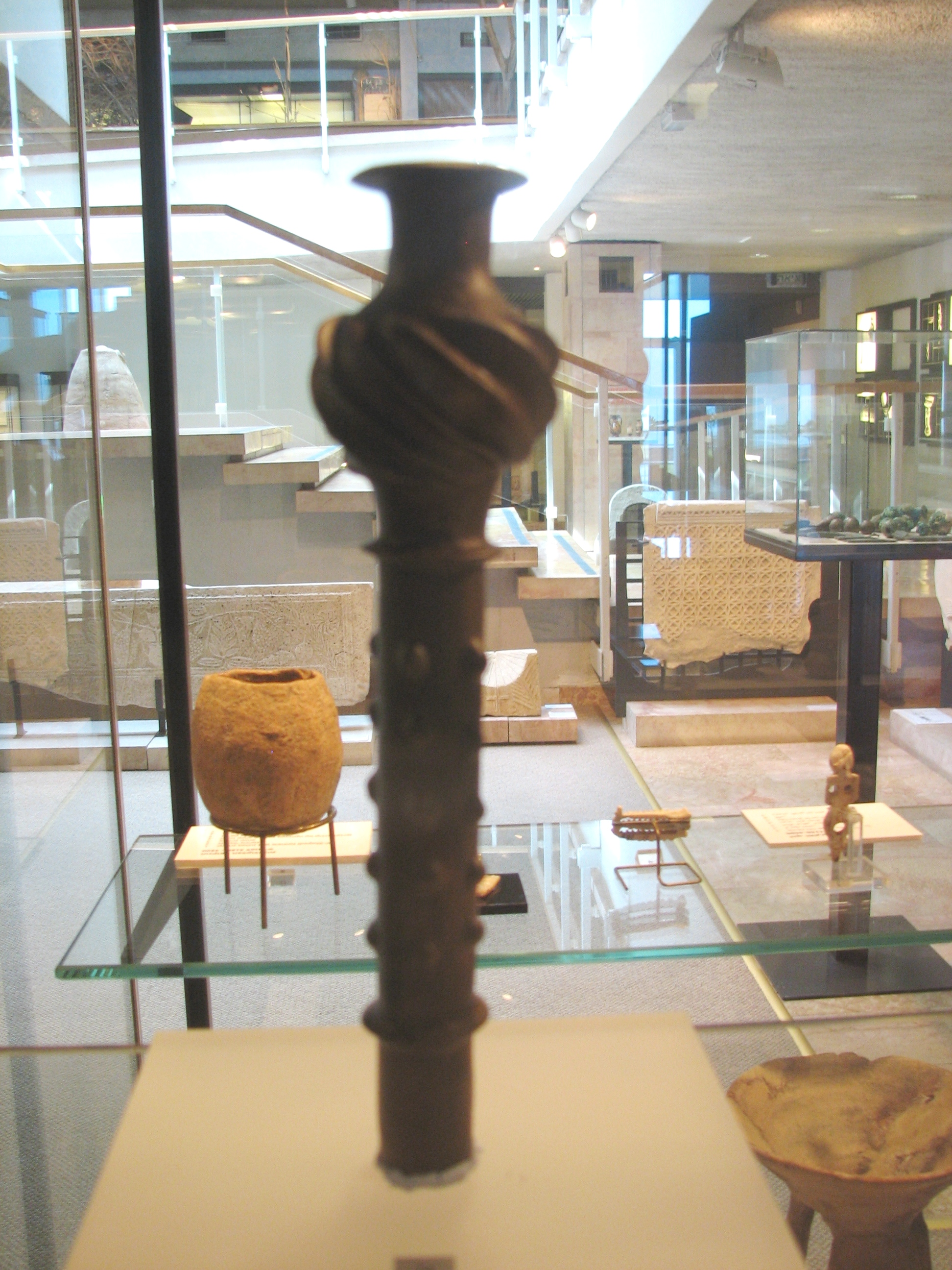 Treasure of Nahal Mishmar is a hoard of Chalcolithic artifacts discovered in a cave on the northern side of Nahal Mishmar. The hoard included 432 copper, bronze, ivory and stone decorated objects; 240 mace heads, about 100 scepters, 5 crowns, powder horns, tools and weapons מטמון נחל משמר התגלה בשנת 1961 במערה בנחל משמר במדבר יהודה בעקבות מבצע חיפוש של מגילות גנוזות. נמצאו ממצאים מהתקופה הכלקוליתית שכללו 442 חפצים, מהם 429 מנחושת, ובהם שרביטים וכלי שנהב, שישה חפצים מהמטיט, אחד מאבן, חמישה מניב של היפופוטם ואחד מחט של פיל. קנה מנחושת - מוזיאון הכט חיפה - העתק